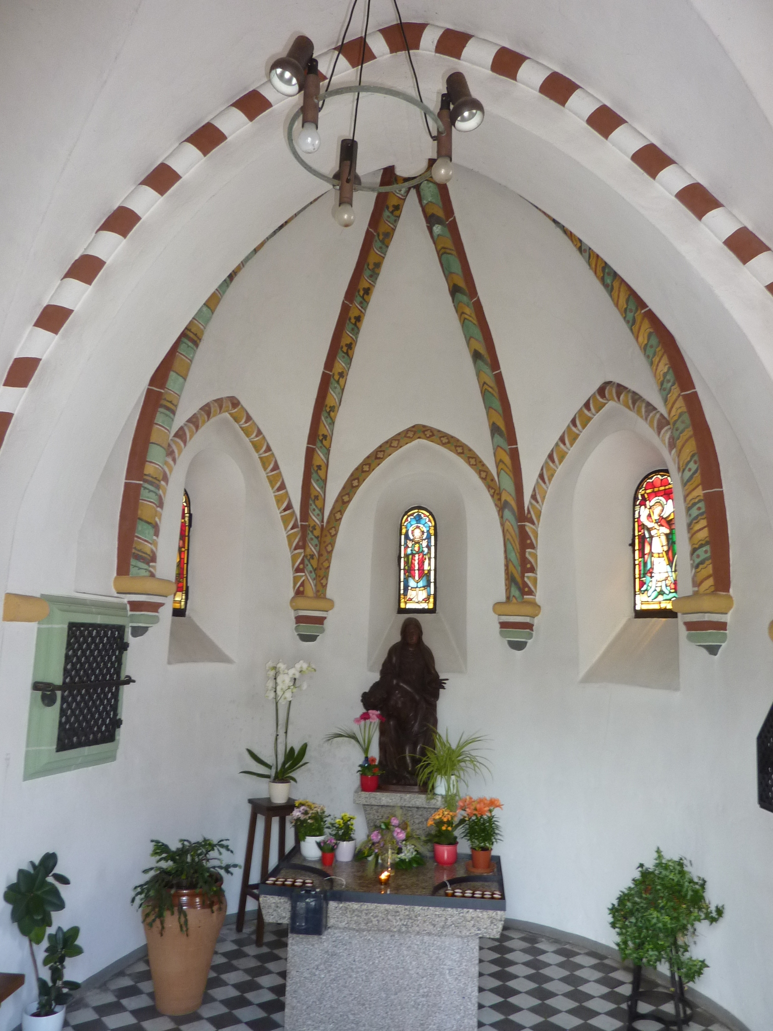 Katholische Pfarrkirche St. Michael, Niederdollendorf: ehemaliger Chorturm, Innenansicht